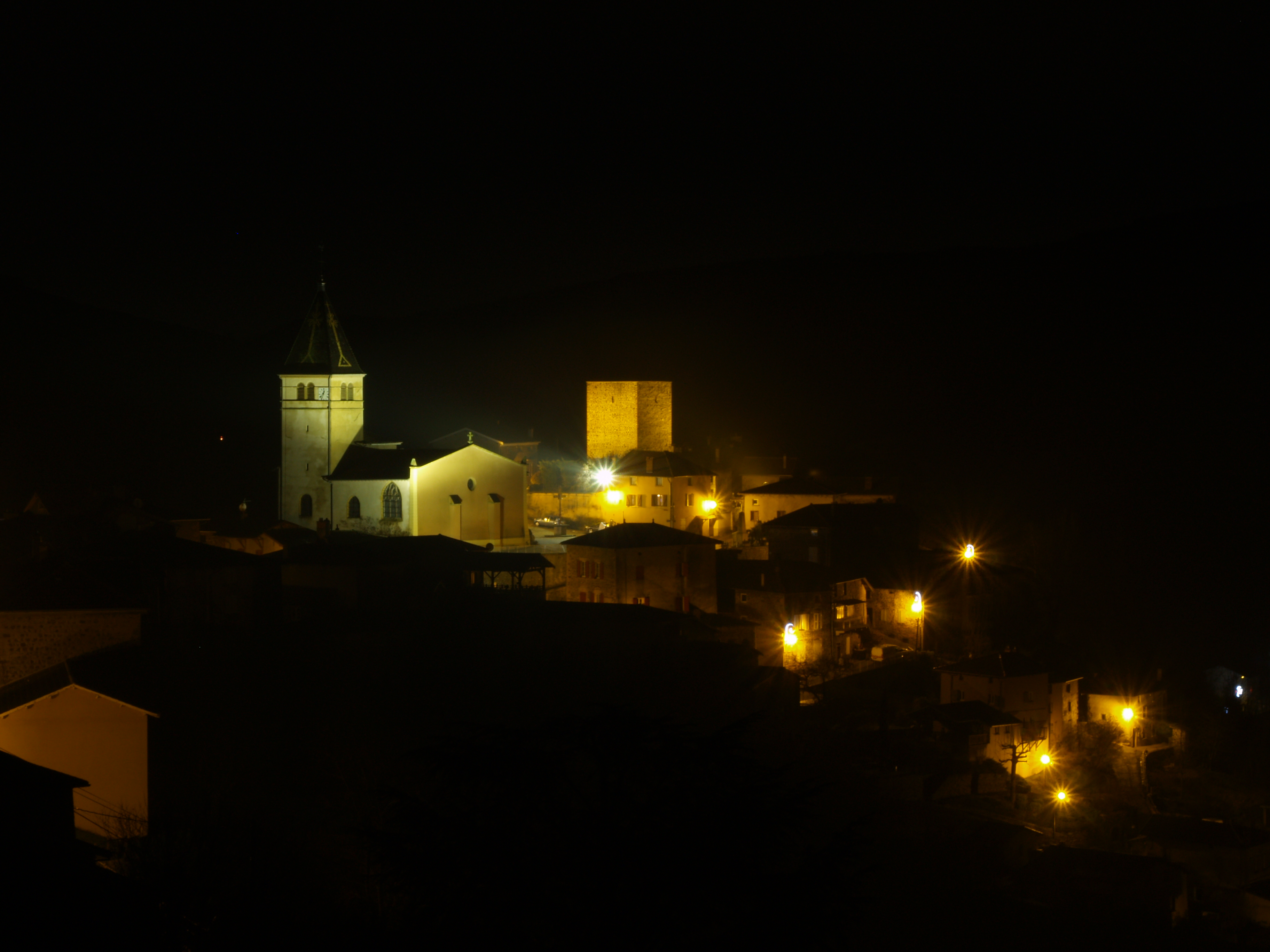 Photo du bourg de Chamelet prise une nuit d'hiver.